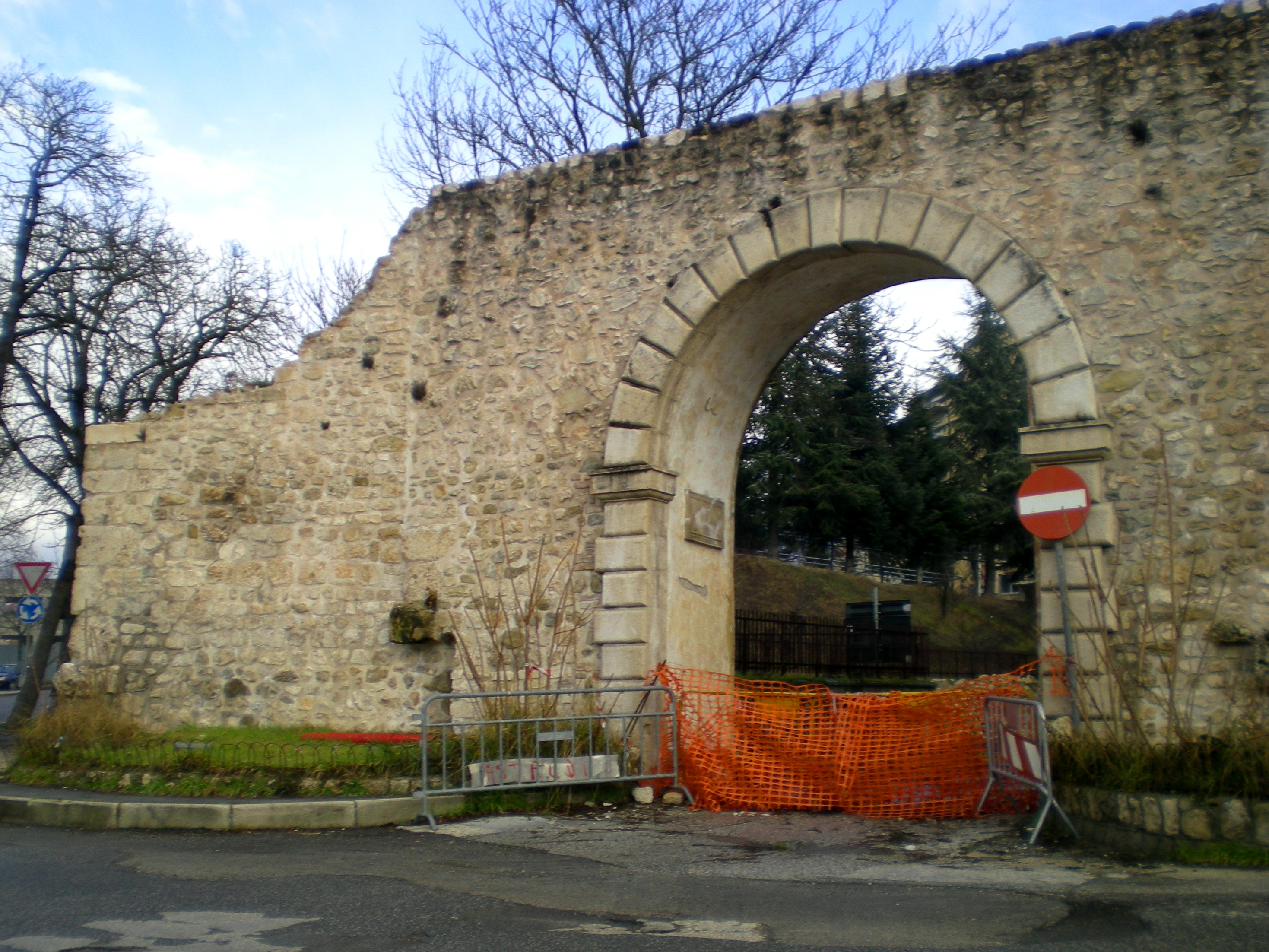 Porta della Stazione (L'Aquila): danneggiamenti in seguito al terremoto del 2009